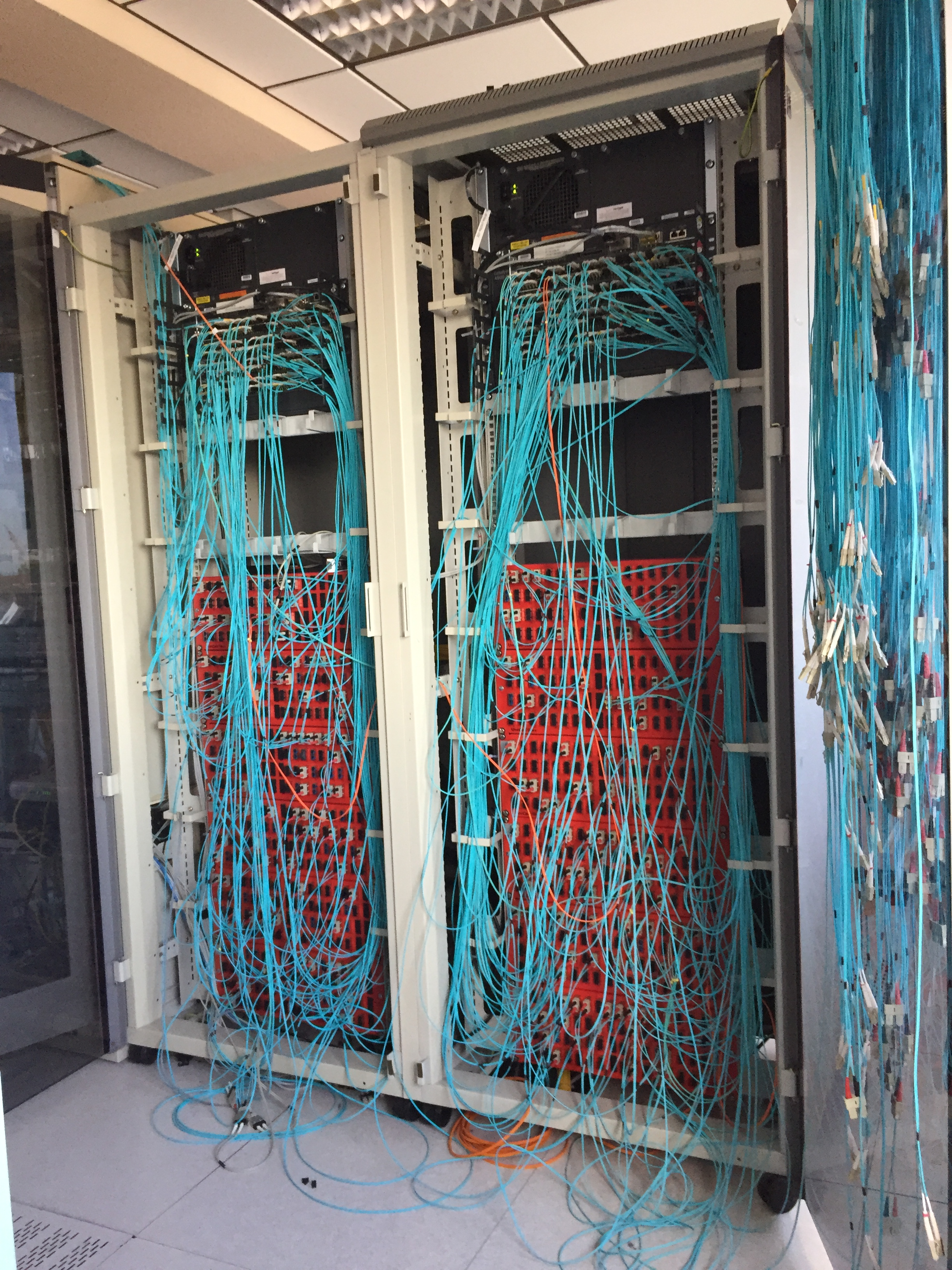 Serverschrank